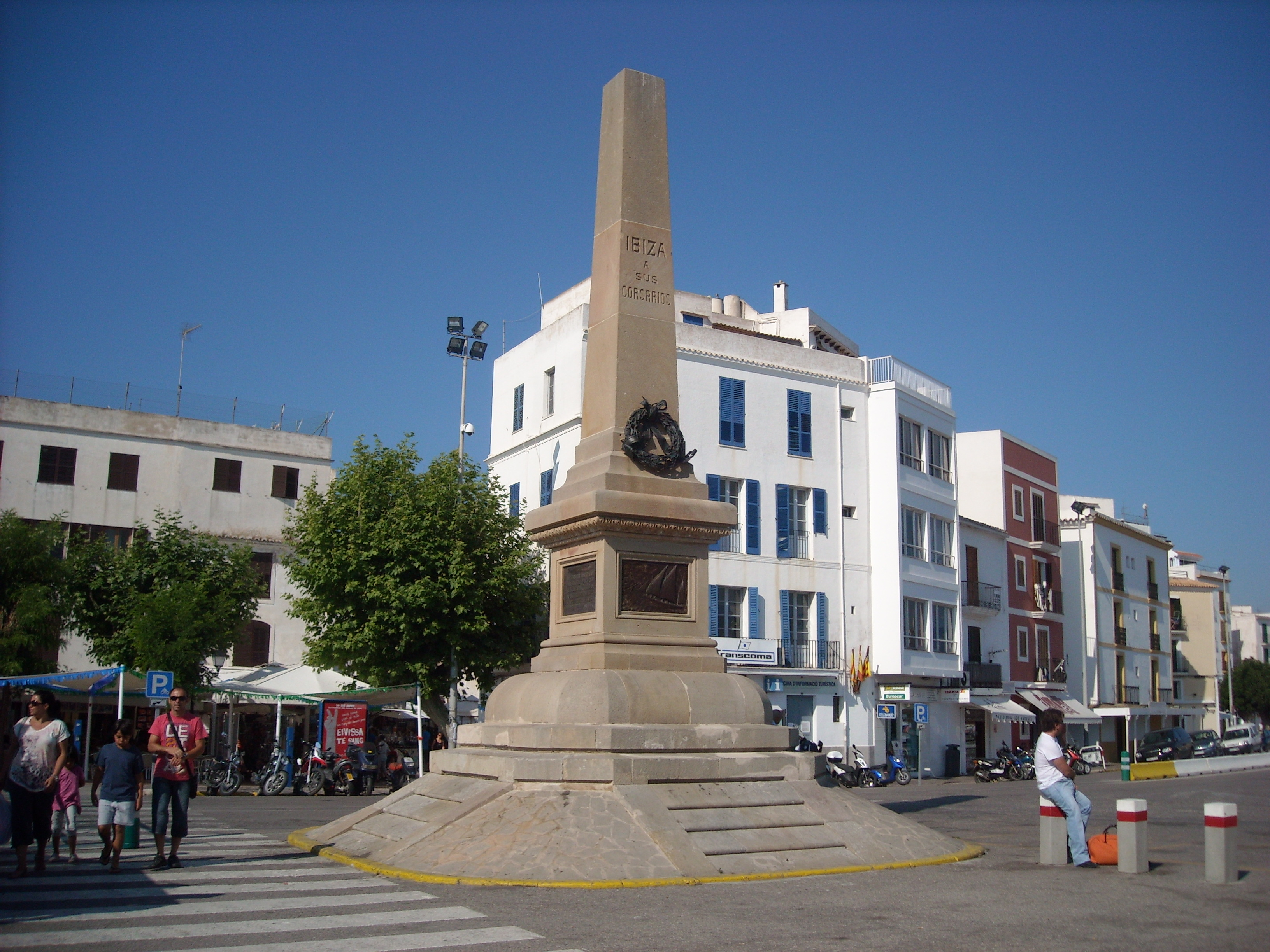 El monumento a sus Corsarios en el Puerto de Ibiza fué inaugurado en el año 1915